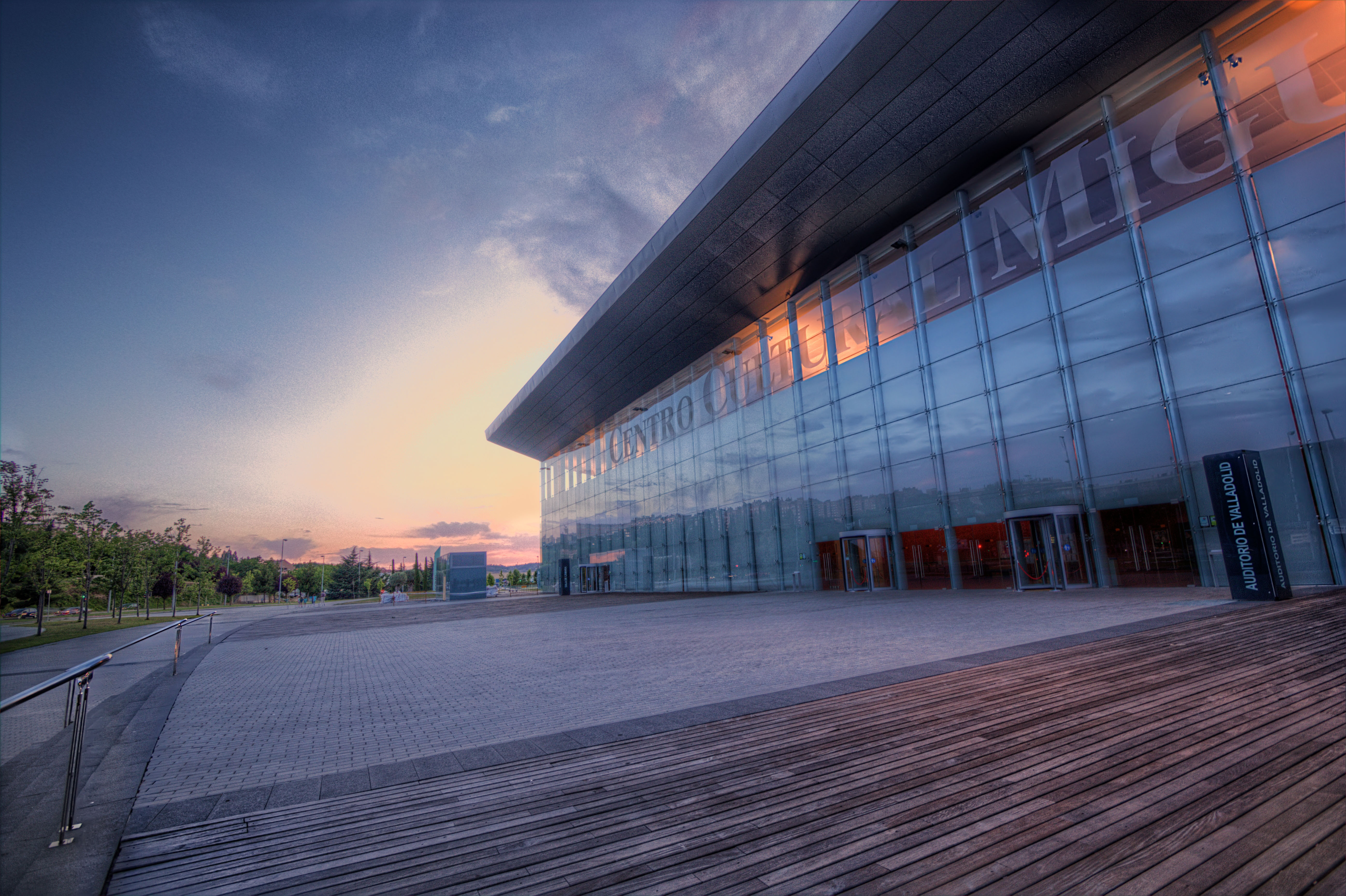 Entrada principal del Centro Cultural Miguel Delibes al atardecer